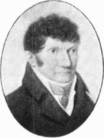 Jacob Edgren (1764-1825), finländsk läkare